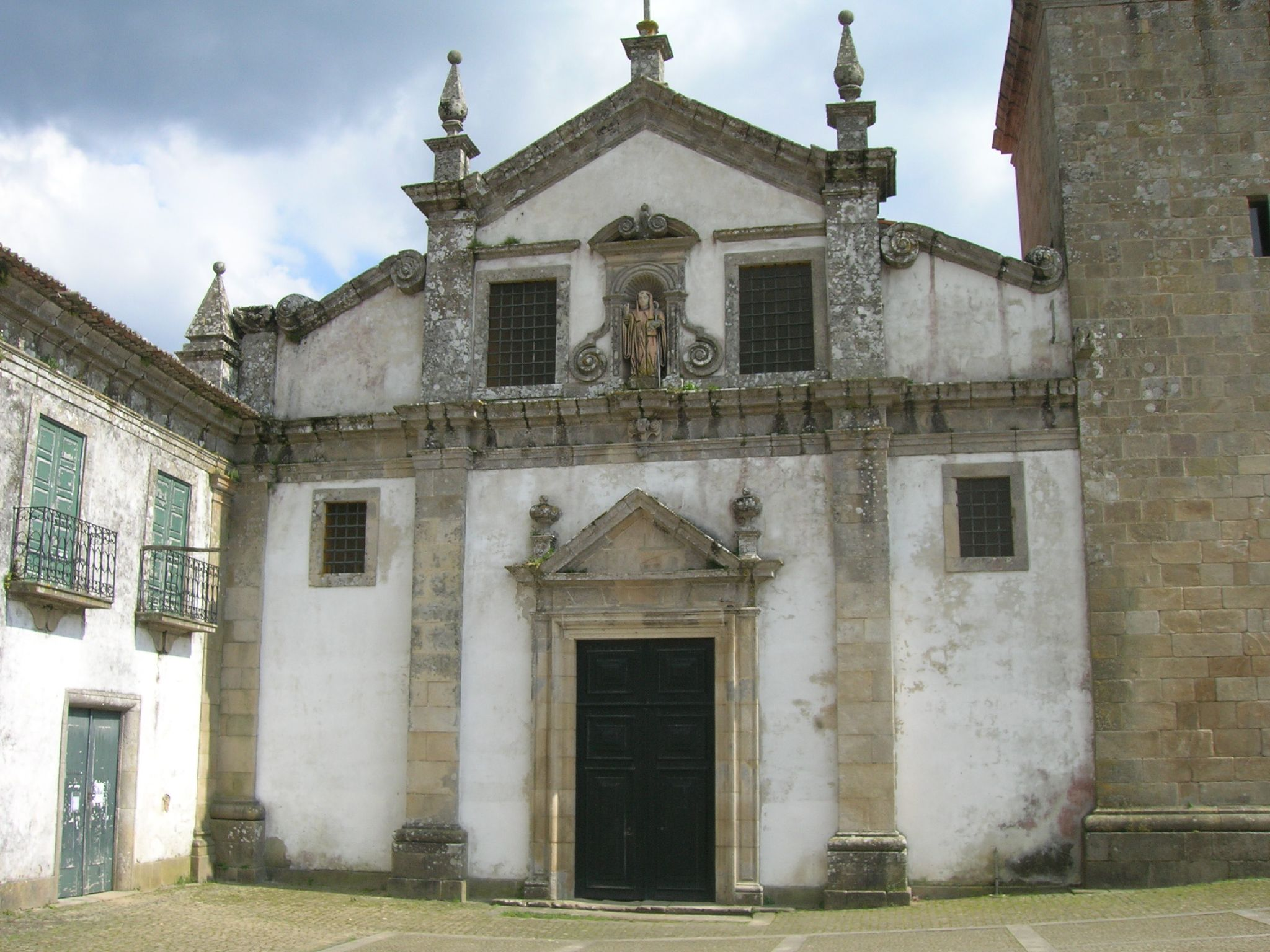 La iglesia románica compuesta de tres naves, perteneció a este monasterio benedictino. Su construcción se remonta posiblemente al siglo XII, siendo remodelada en el siglo XVII y en el XVIII. Valença, Portugal.